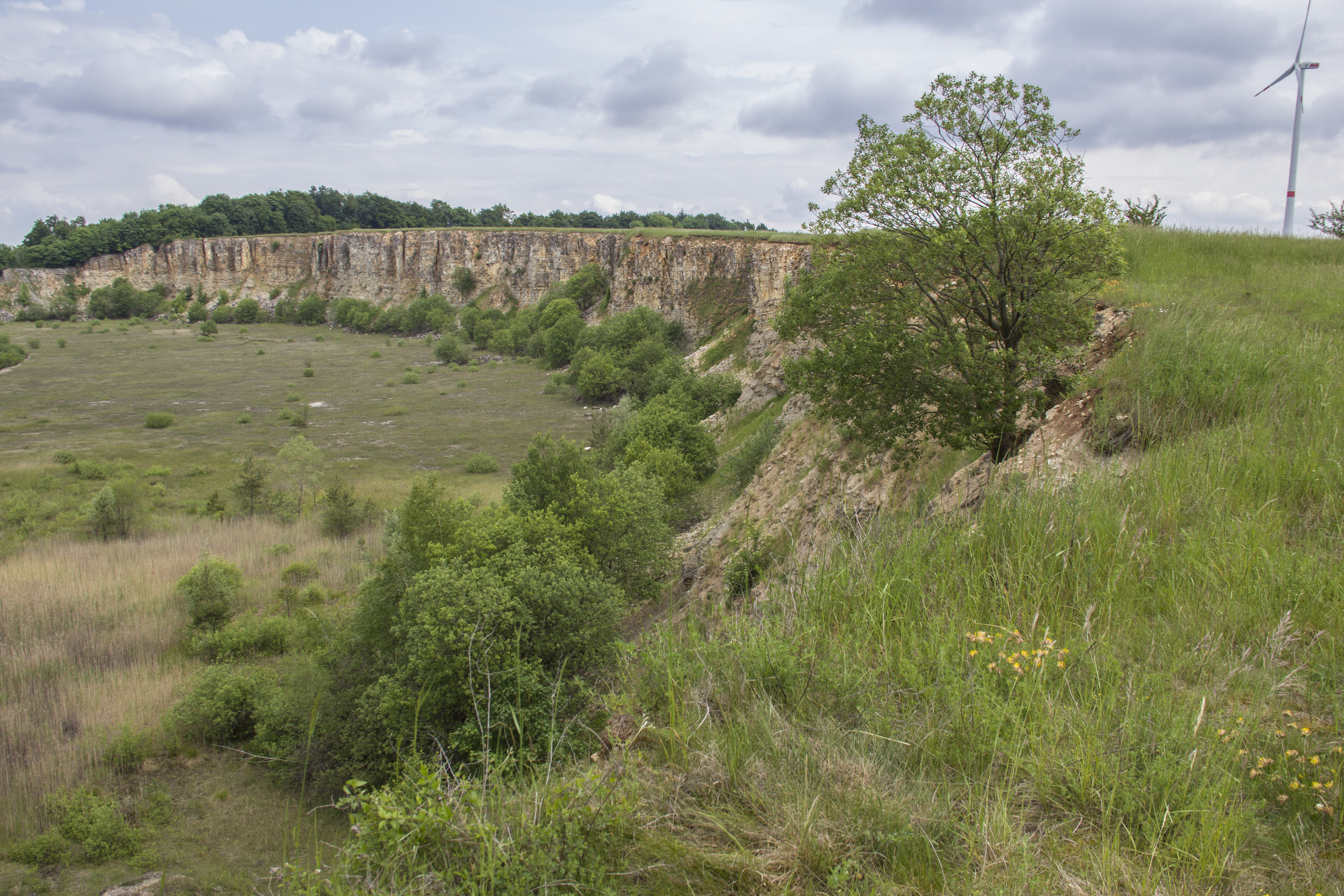 Ehemaliger Steinbruch nordöstlich von Sengenthal, Geotop, FFH Schutzgebiet